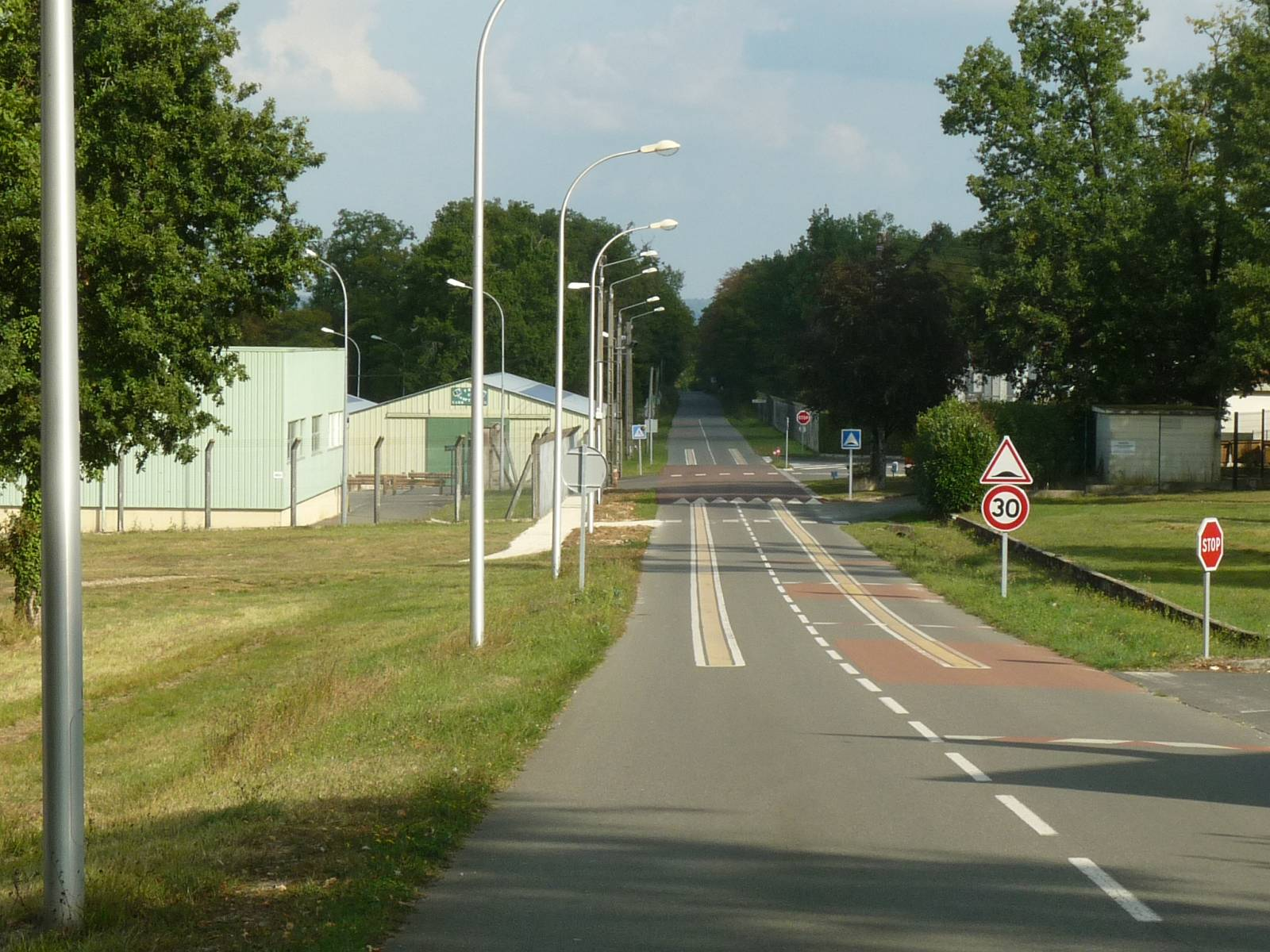 Camp militaire 515 RT en forêt de la Braconne (16), France